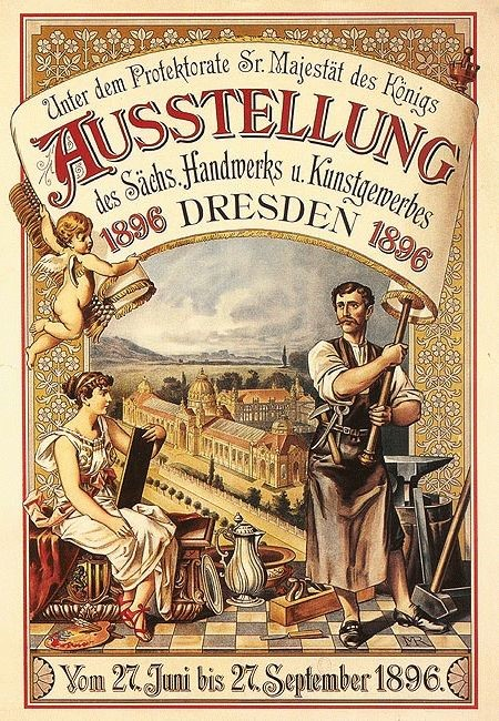 Die sächsische Ausstellung in Dresden, des Handwerks und Kunstgewerbes, 1896.